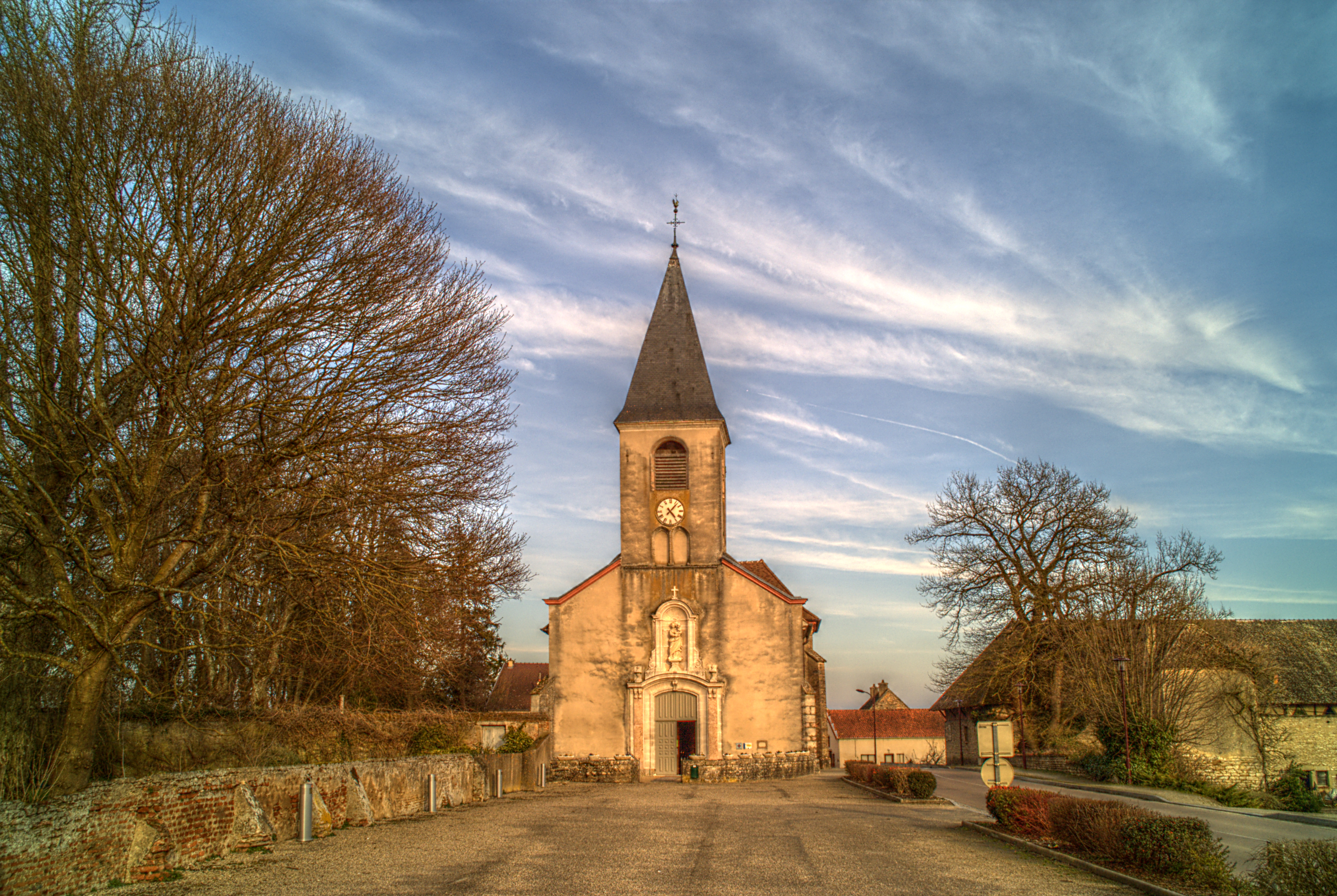 Église de la Nativité de la Vierge, Allerey-sur-Saône (Saône-et-Loire, Bourgogne, France)